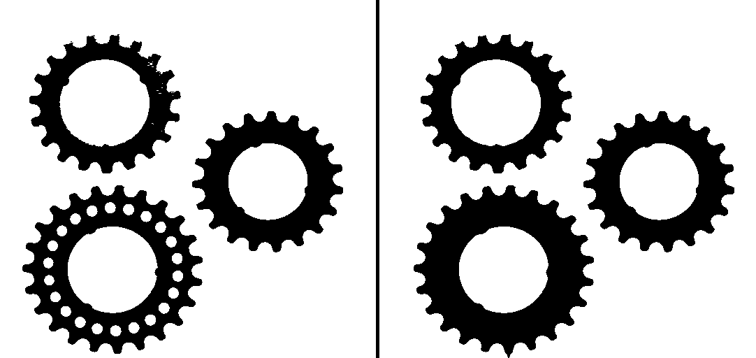 Binärbild von Zahnrädern vor und nach einer morphologichen Schließung.